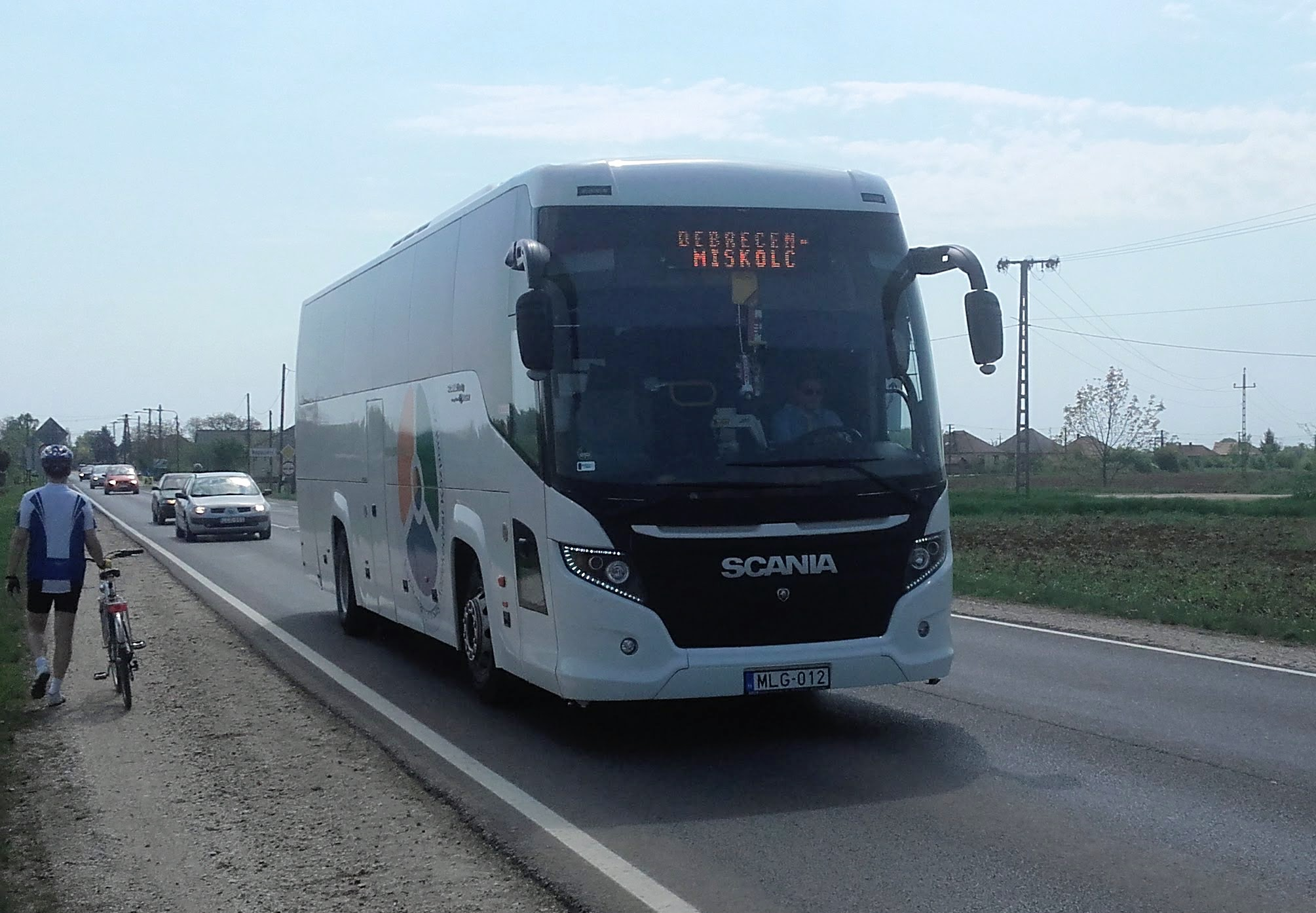 Az ÉMKK MLG-012 rendszámú Scania Higer A80T busza Nagycsécsen, a 1372-es távolsági járaton.